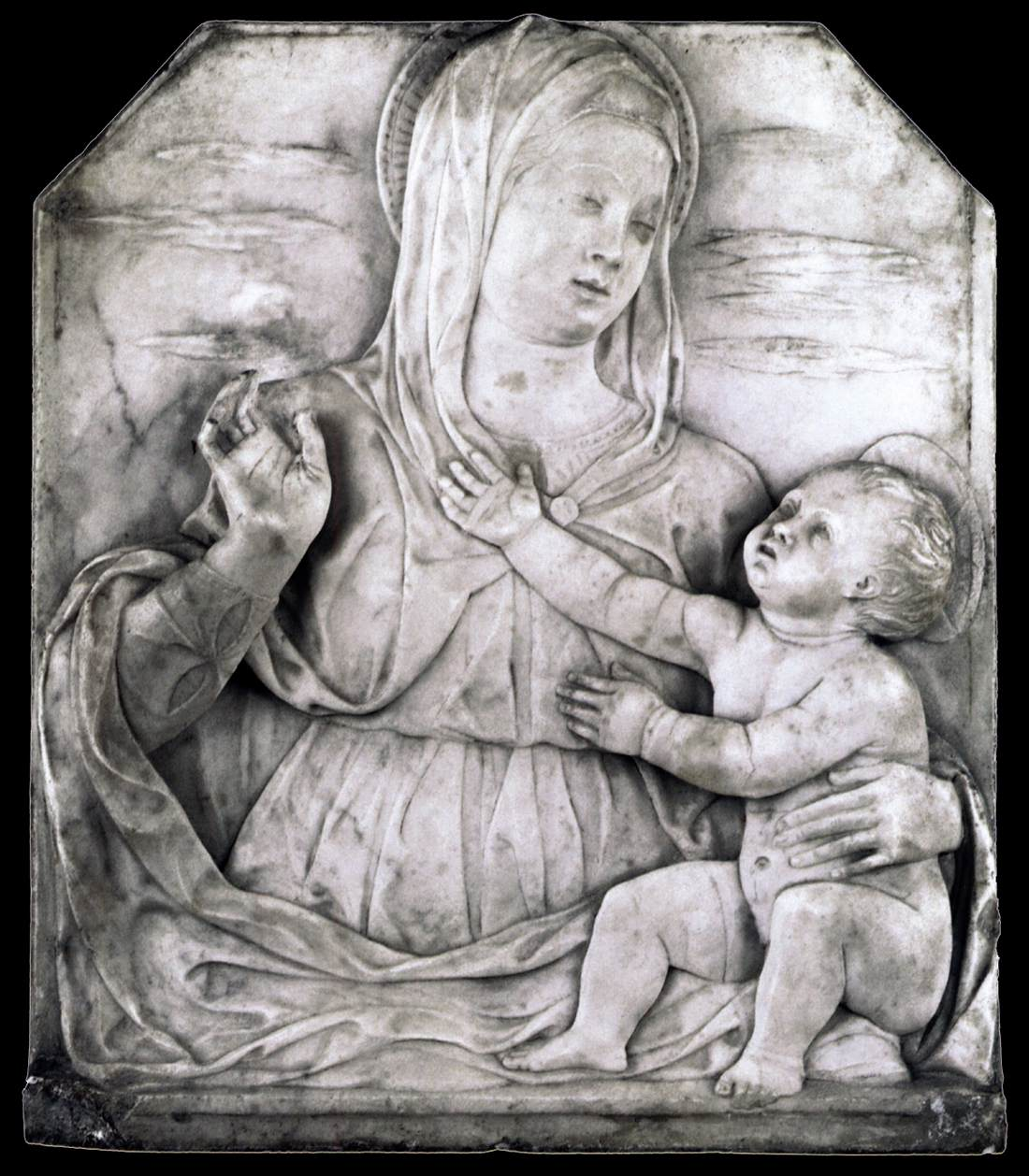 Vergine e Bambino - Museo Liechtenstein - Vienna Marmo, 40 x 34 cm - 1531 Liechtenstein Museum, Vienna